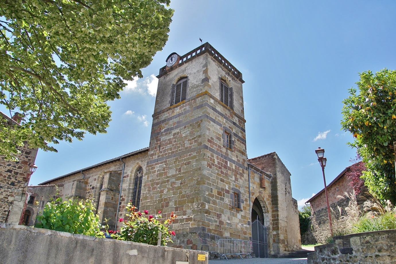 Puy de Dôme